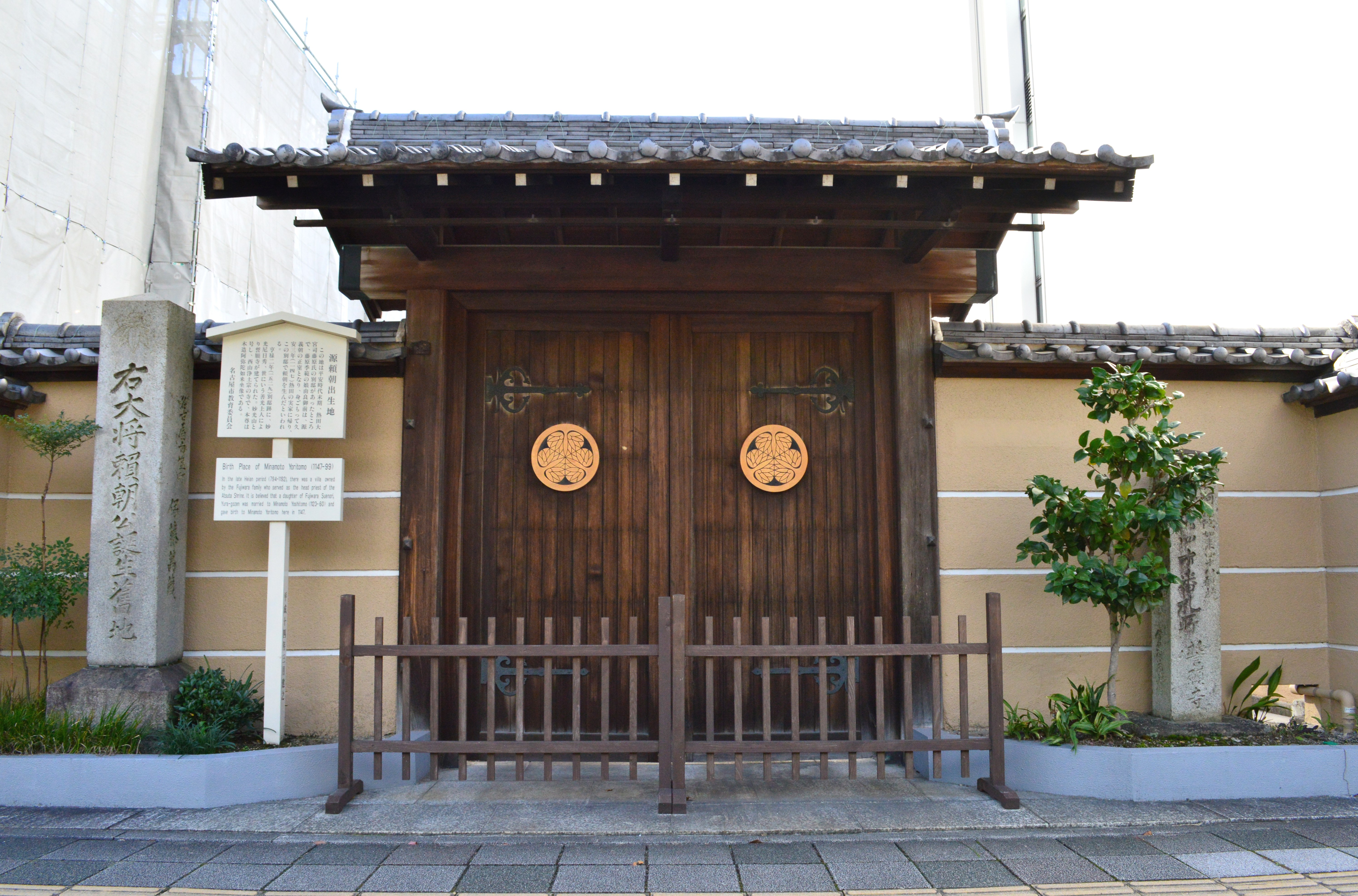 誓願寺 (名古屋市) 山門